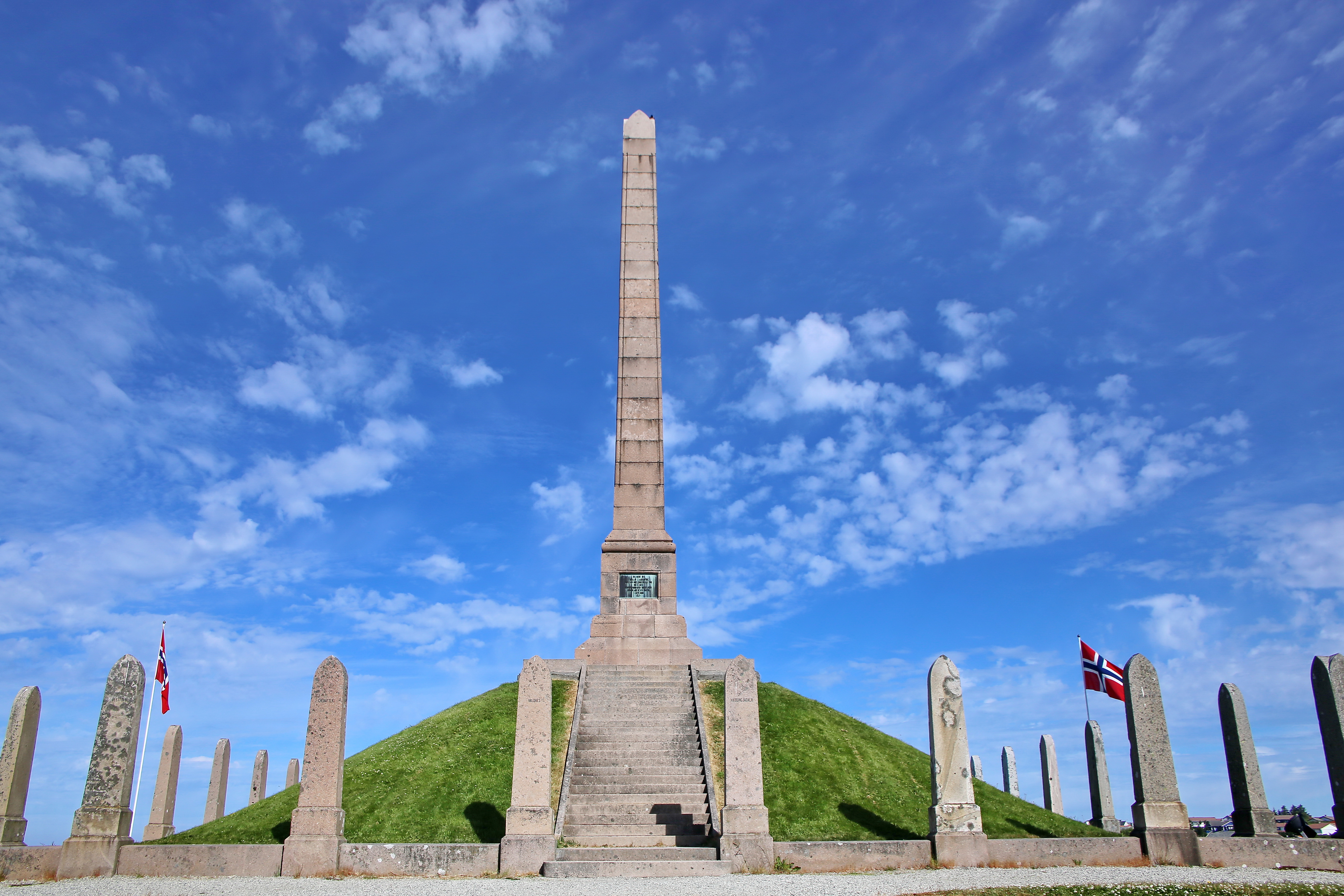 Haraldshaugen in Haugesund ist Norwegens Reichsmonument.